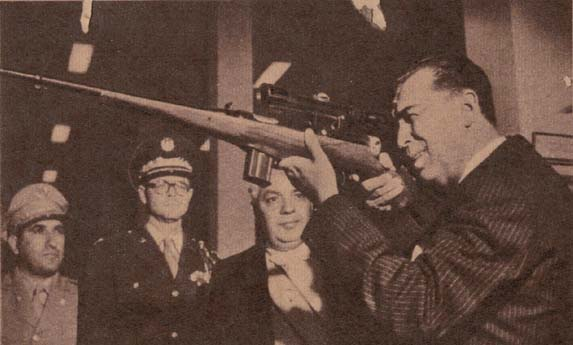 Juscelino Kubitschek fazendo pontaria com um fuzil numa exposição de armas junto com Héctor Trujillo.